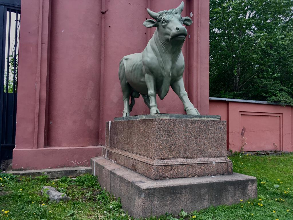 Быки скотопригонного двора, ныне украшающие мясокомбинат "Самсон". На Московском шоссе 13